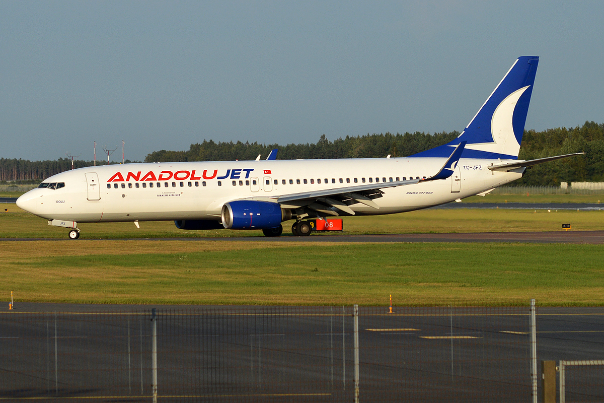 Anadolu Jet, TC-JFZ, Boeing 737-8F2